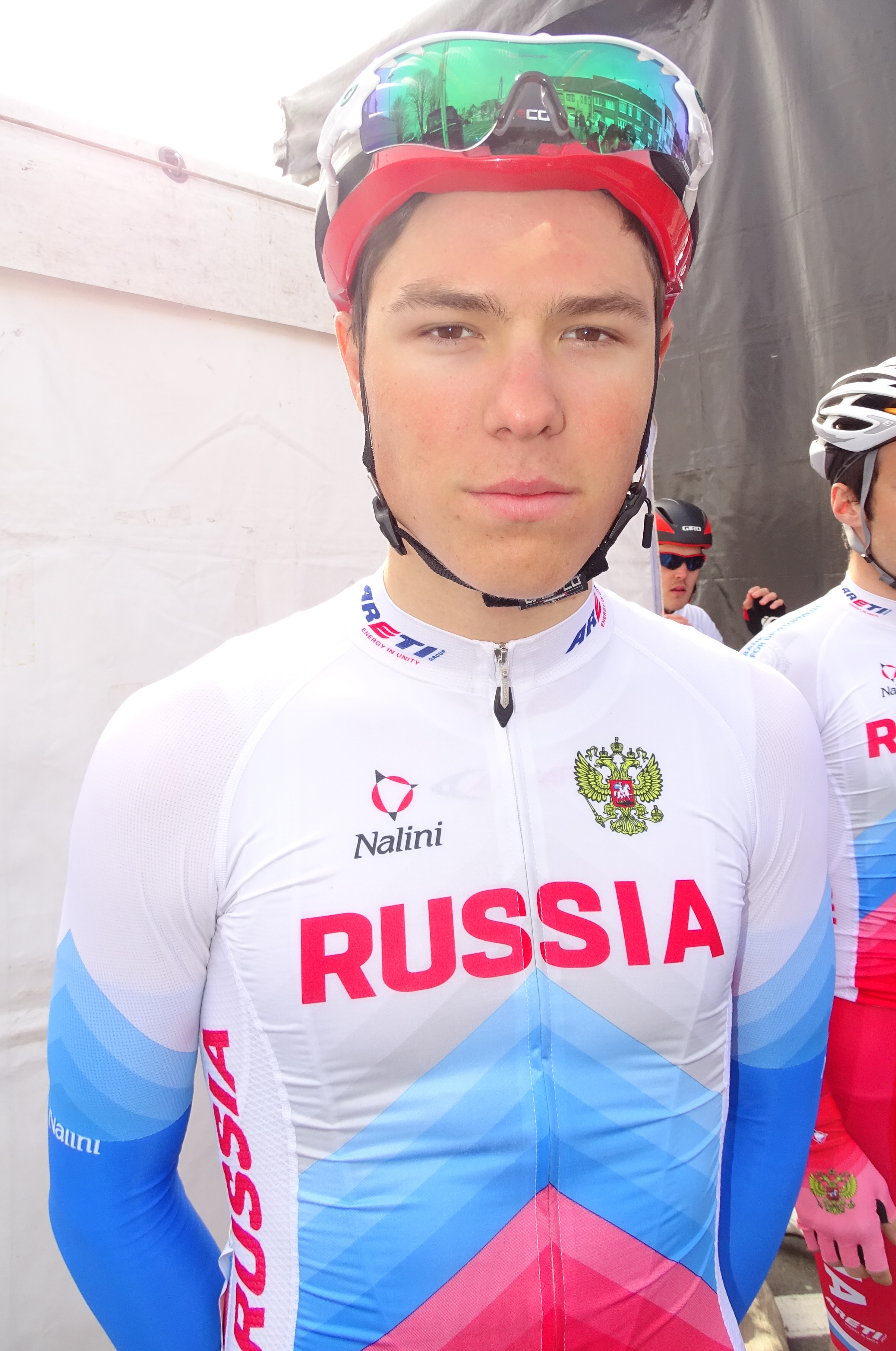 Reportage réalisé le samedi 9 avril à l'occasion du départ et de l'arrivée du Tour des Flandres espoirs 2016 à Audenarde, Belgique.